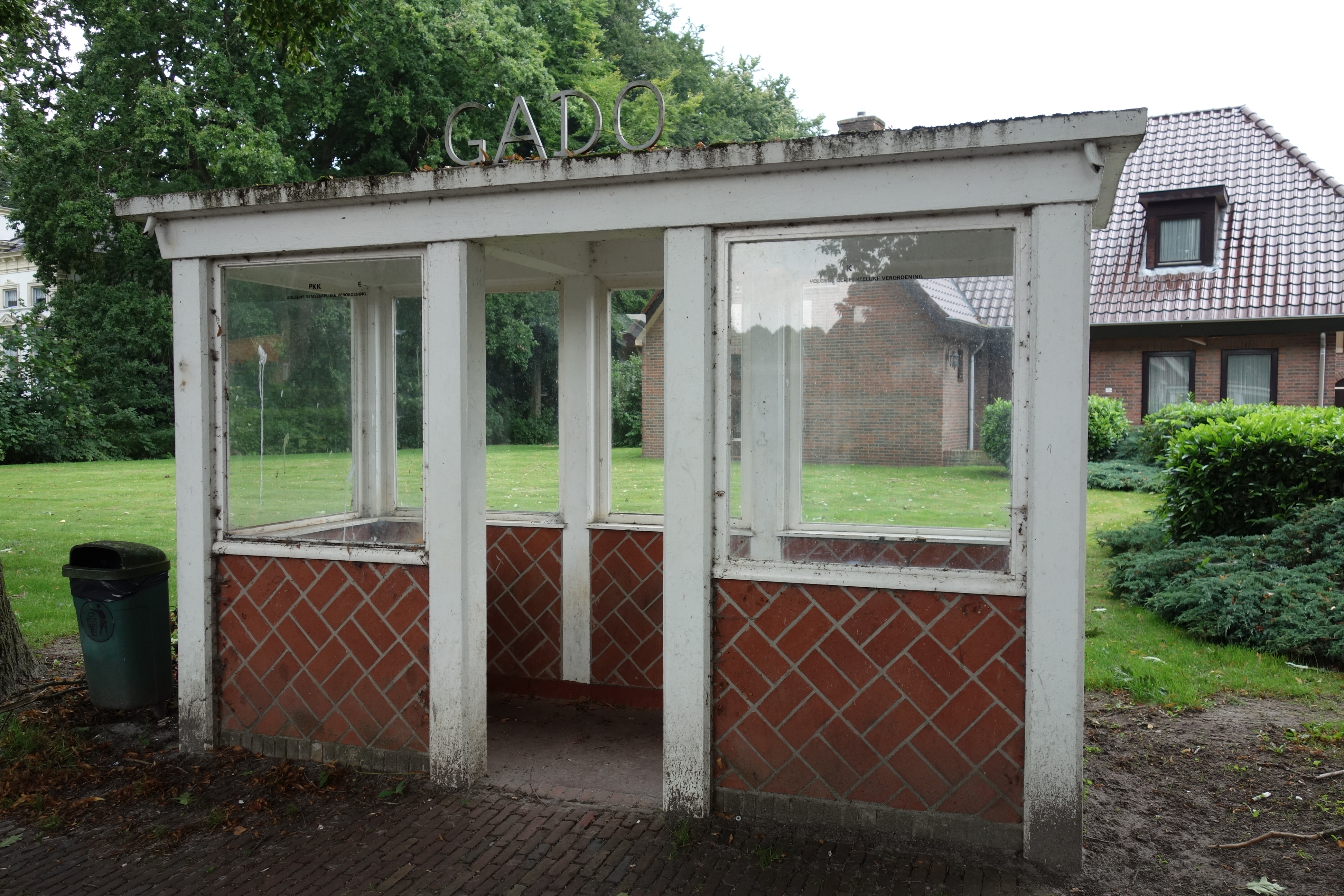 Abri van de Groninger Autobusdienst Onderneming in Bellingwolde. Het abri maakt nog altijd deel uit van een bestaande bushalte: halte Reiderlandstraat.